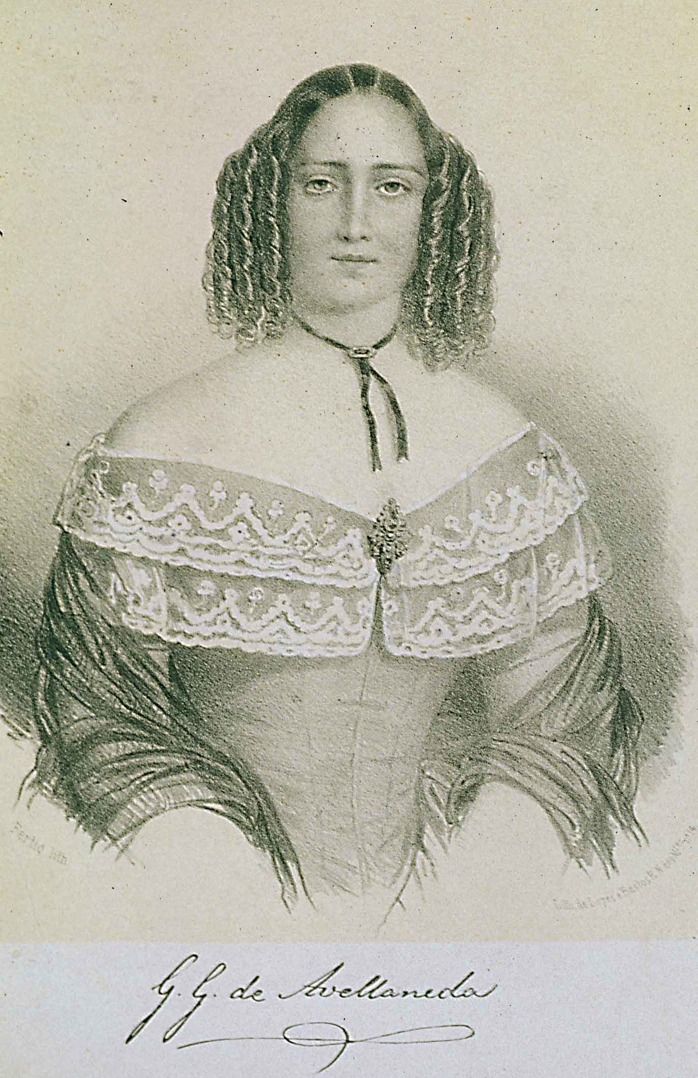 Retrato de la escritora cubana Gertrudis Gómez de Avellaneda (1814-1873).